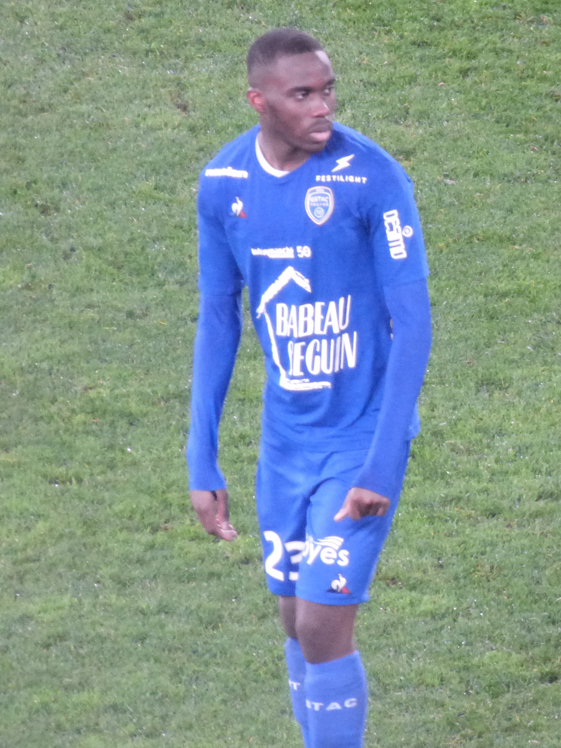 Stone Mambo lors du match RC Lens / ES Troyes AC, comptant pour la vingt-troisième journée du championnat de France de football de Ligue 2 2019-2020, le 4 février 2020, au Stade Bollaert-Delelis de Lens